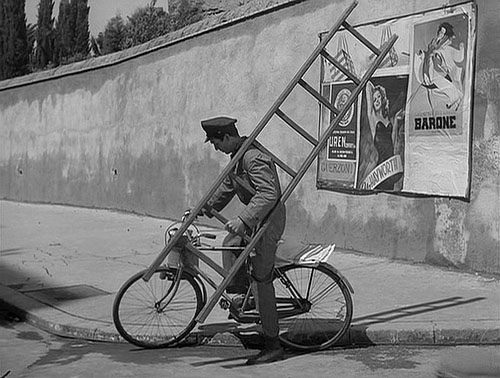 Scena del film Ladri di biciclette (1948), di Vittorio De Sica